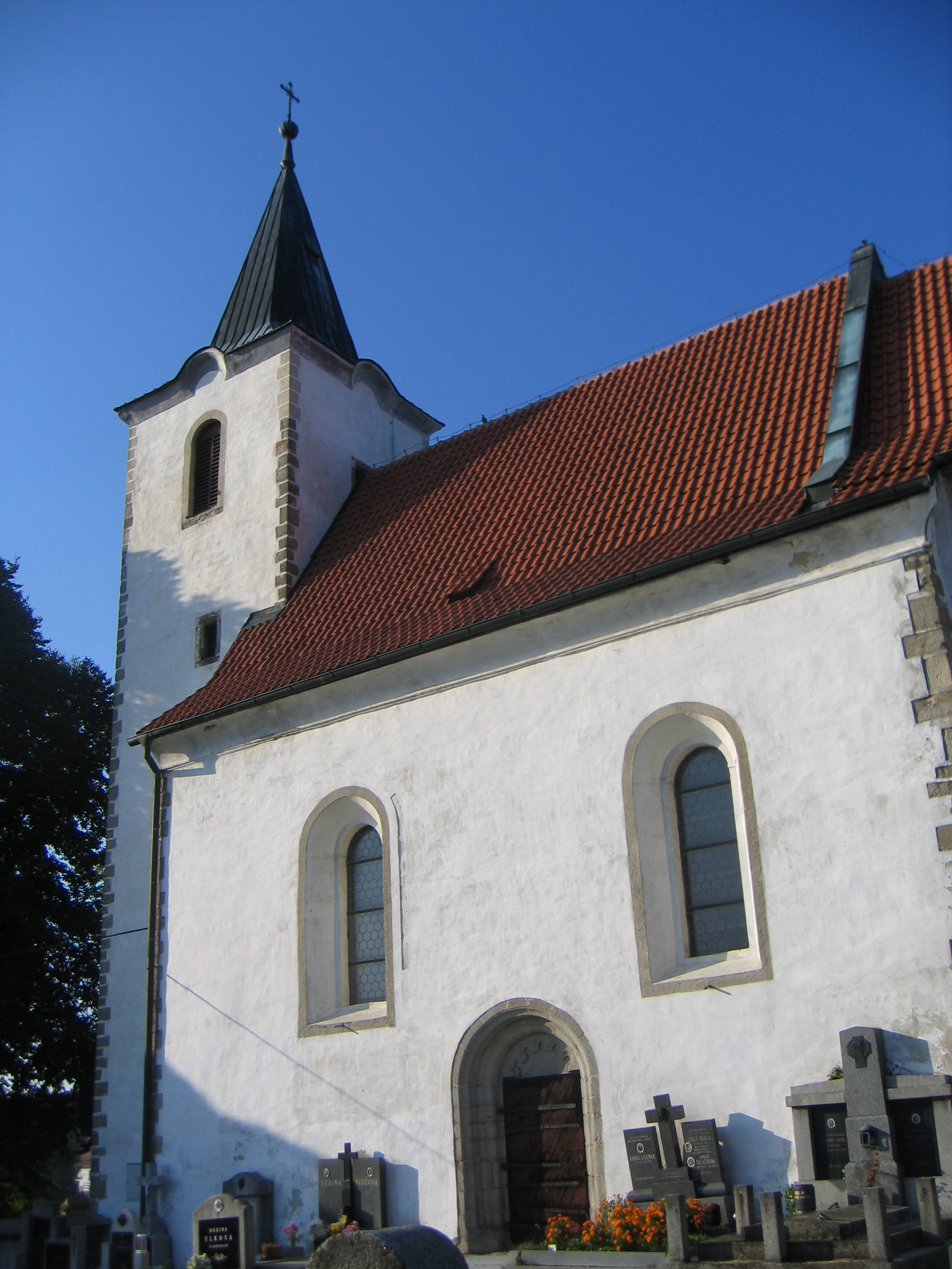 Kaple sv. Markéty (Klášter), SZ okraj obce, Klášter